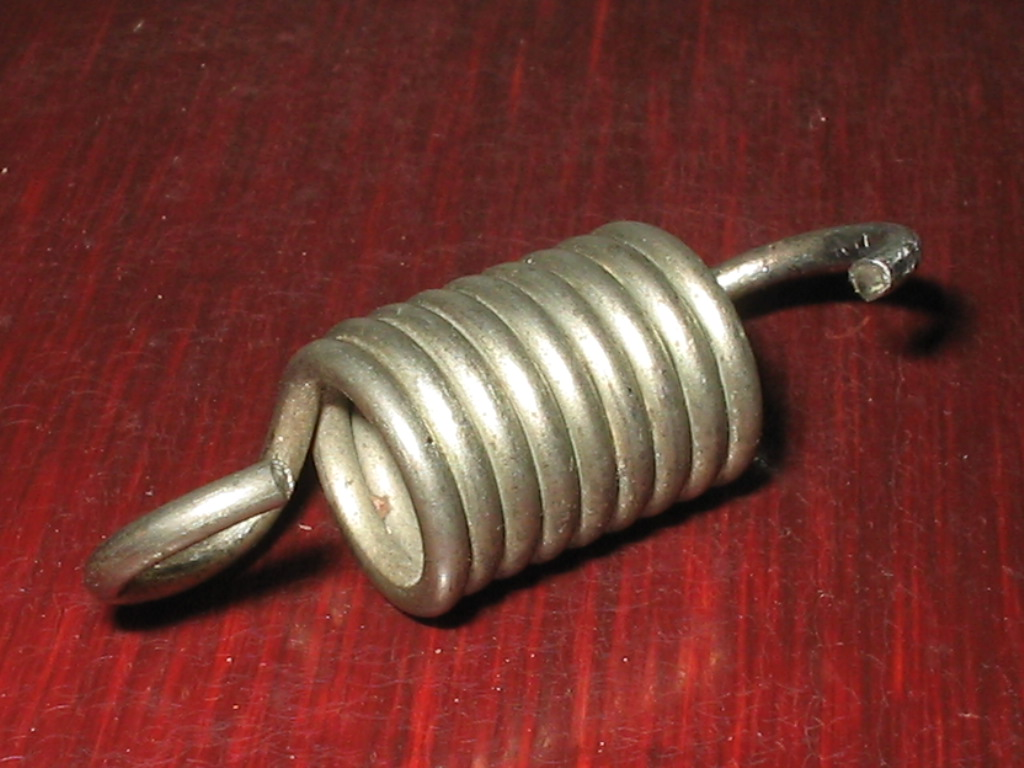 trekveer Categorie:Wikipedia:Afbeeldingen/Gebruiker:Michiel1972